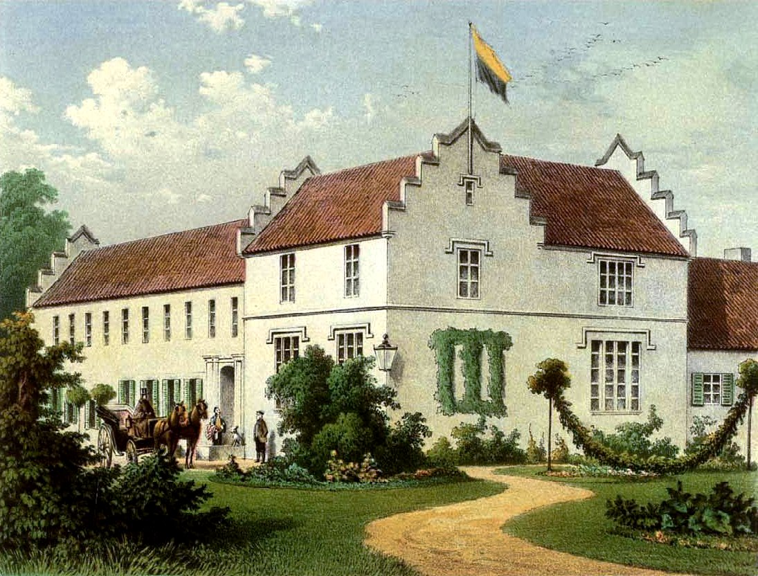 Rittergut Nassenheide, Kreis Randow, Provinz Pommern